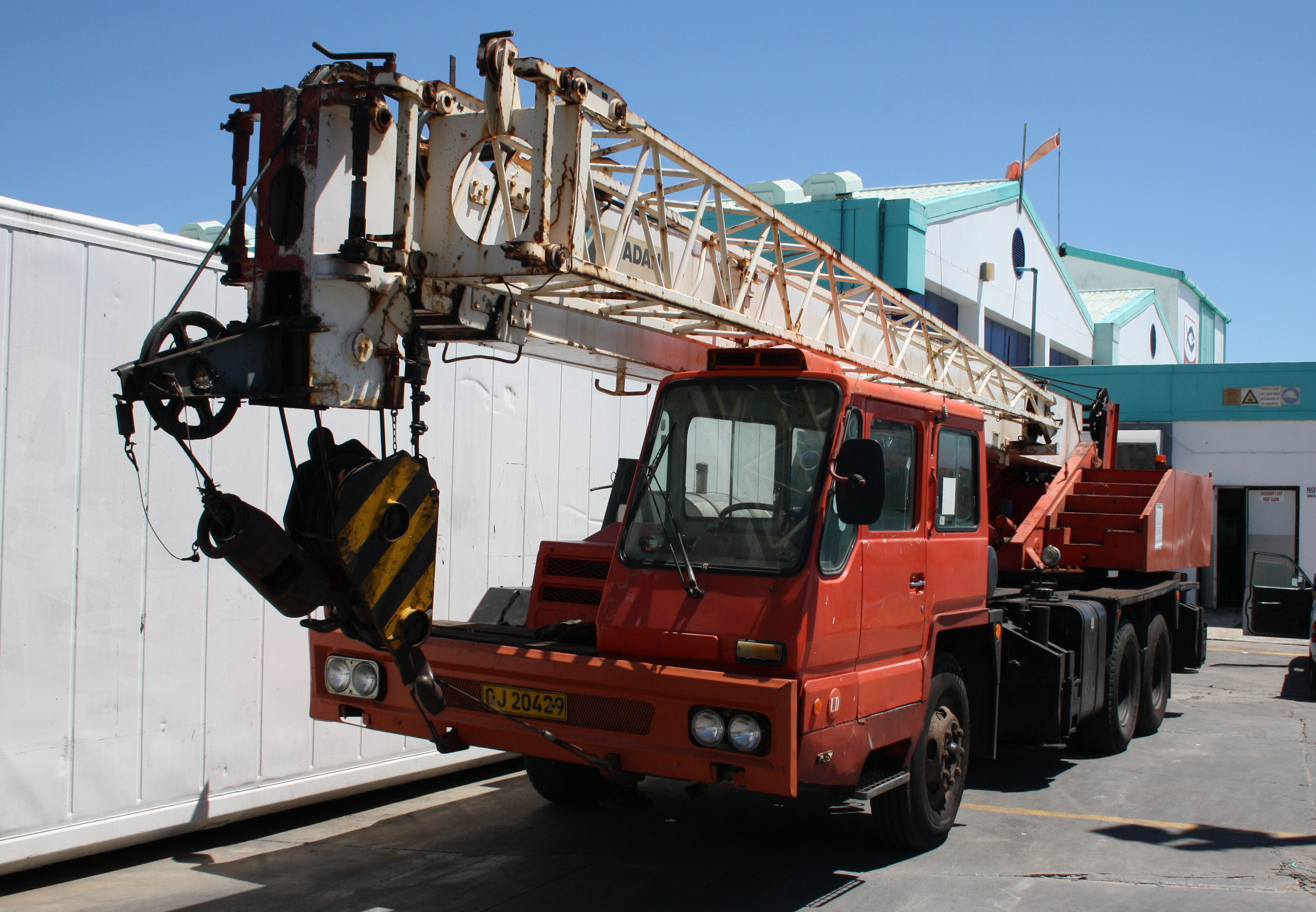 1997 Tadano crane